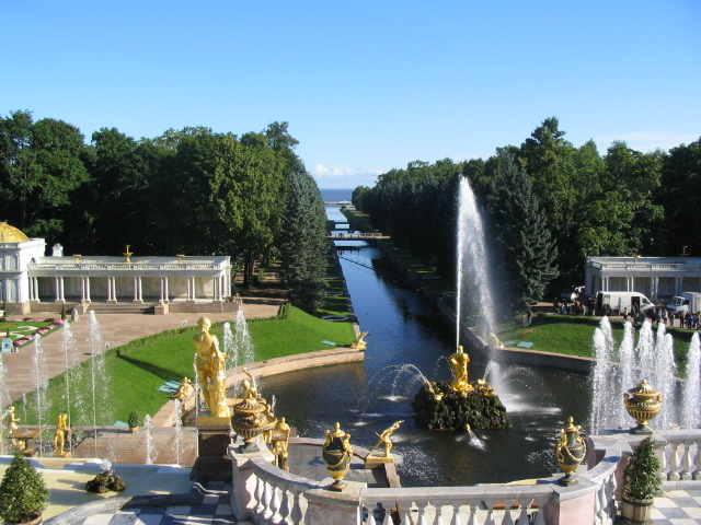 Peters Sommerresidenz Peterhof: Große Kaskade, im Hintergrund der finnische Meerbusen.